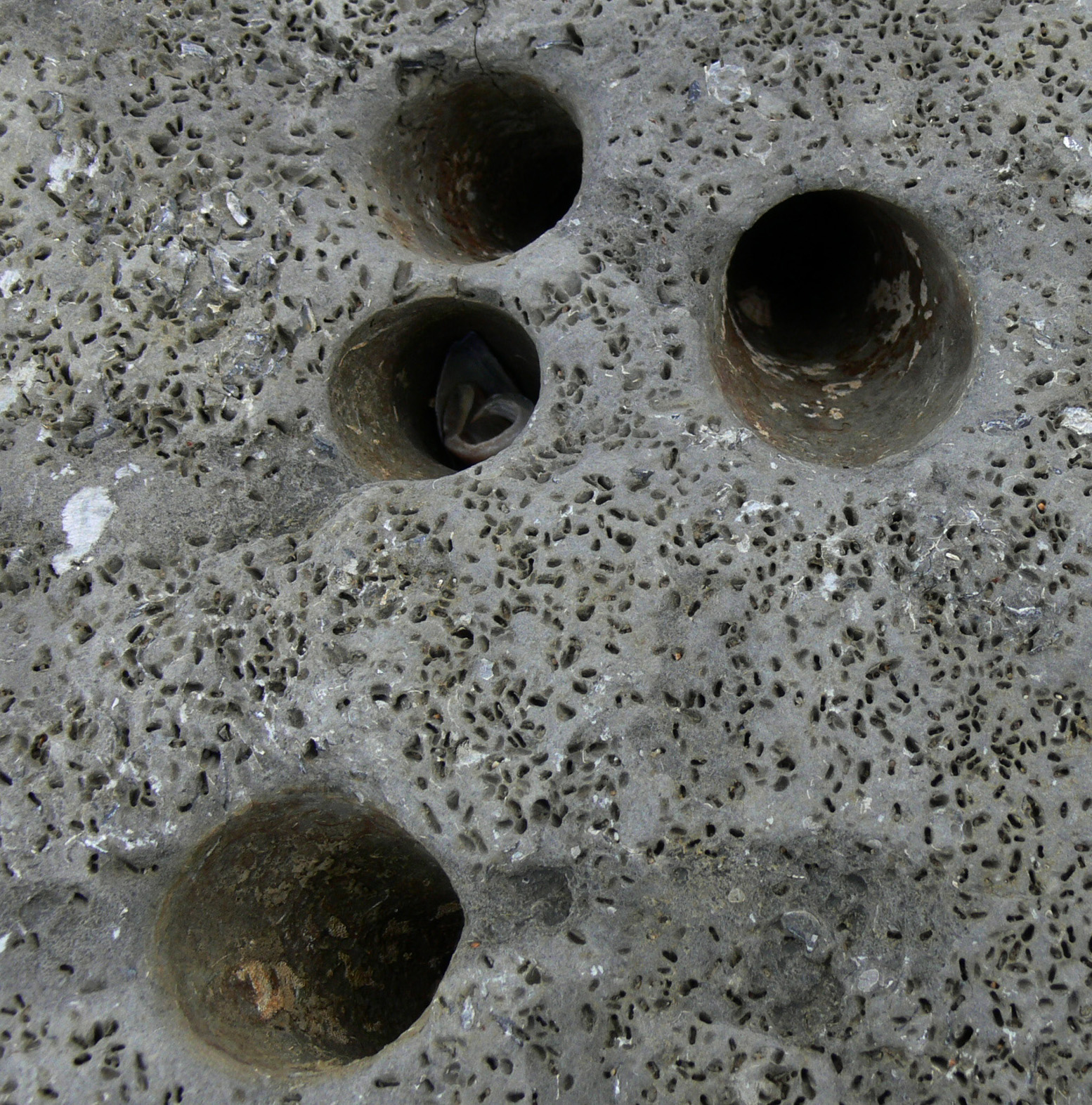 puits forés par des pholades dans une roche calcaire assez dure. (trou = diamètre d'un doigt) entre calais et boulogne (France), sur le littoral du pas de calais. own work